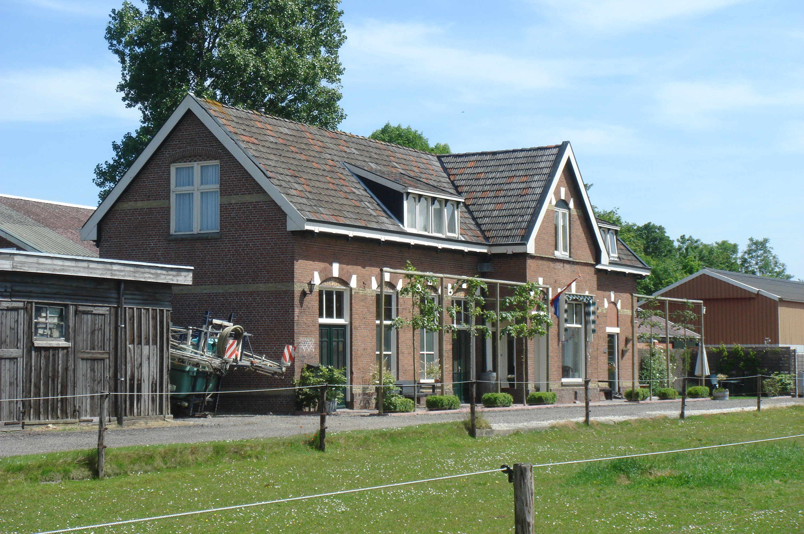 Voormalig station Ternaard (foto: Daniel van der Ree)